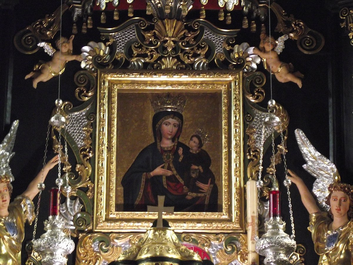 Cudowny obraz Matki Boskiej Rychwałdzkiej umieszczony w ołtarzu głównym.